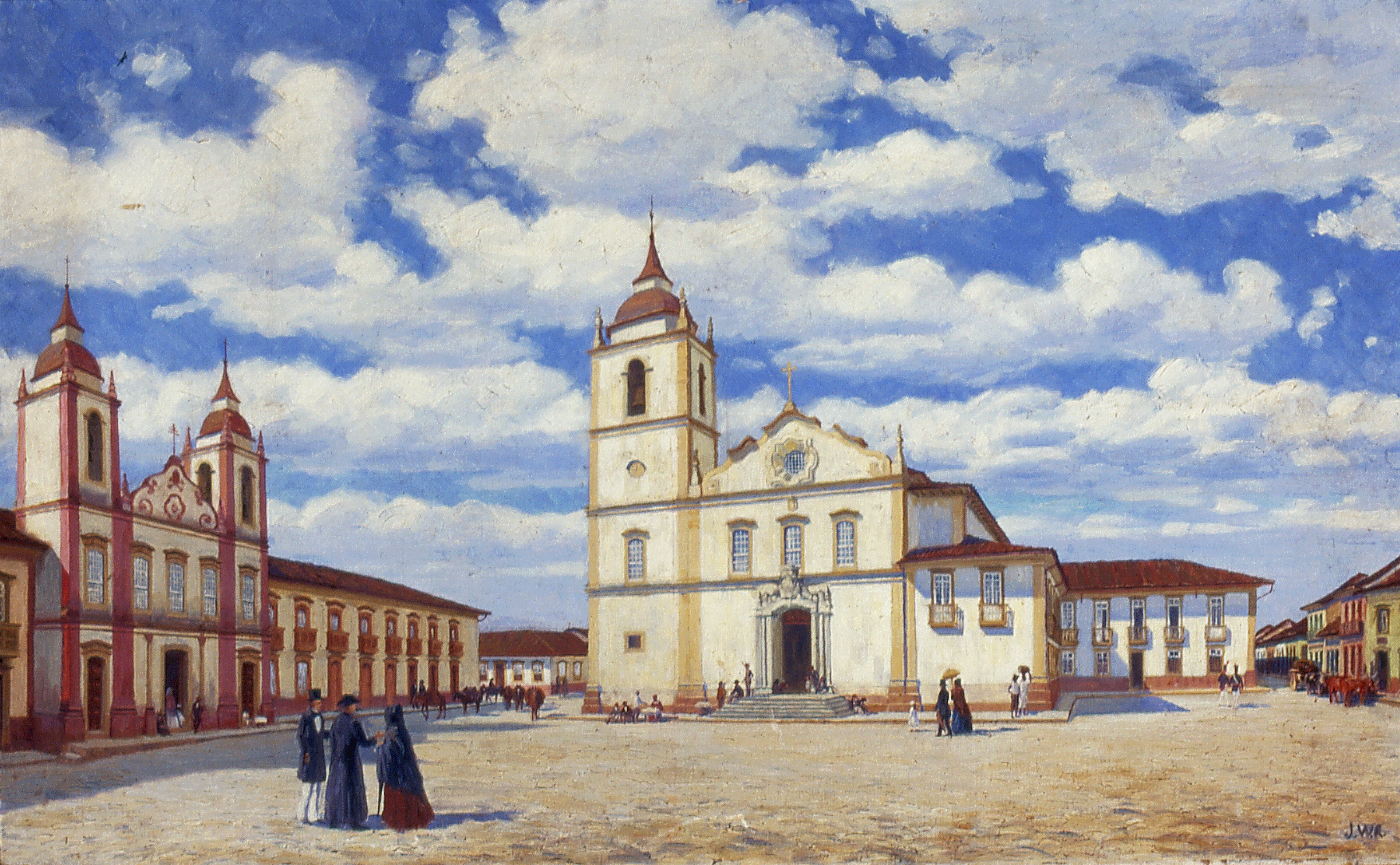 Obra que integra o acervo do Museu Paulista da USP. Coleção José Wasth Rodrigues - CJWR